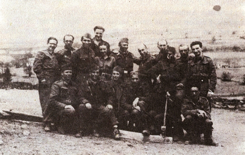 Членови на Главниот штаб на НОВ и ПОМ, на ЦК на КПМ, на Иницијативниот одбор за свикување на АСНОМ и други борци. Одлево надесно седат: Кирил Петрушев, Михаило Апостолски, Методија Андонов – Ченто, Светозар Вукмановиќ – Темпо, Лазар Соколов. Во горниот ред: Епаминонда Поп Андонов, Мане Чучков, Страхил Гигов, Мара Нацева, Митко Зафировски, Бане Андреев, Киро Глигоров, слободна територија Козјак (Кумановско), мај - јуни 1944 година.